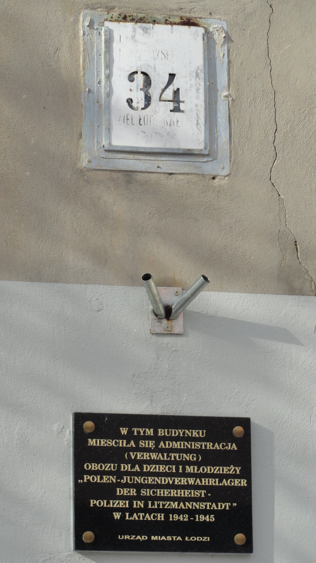 Widok ogólny tablicy pamiątkowej obozu przy ul. Przemysłowej w Łodzi, na ścianie budynku przy ul. Przemysłowej 34, w którym mieściła się komendantura obozu.